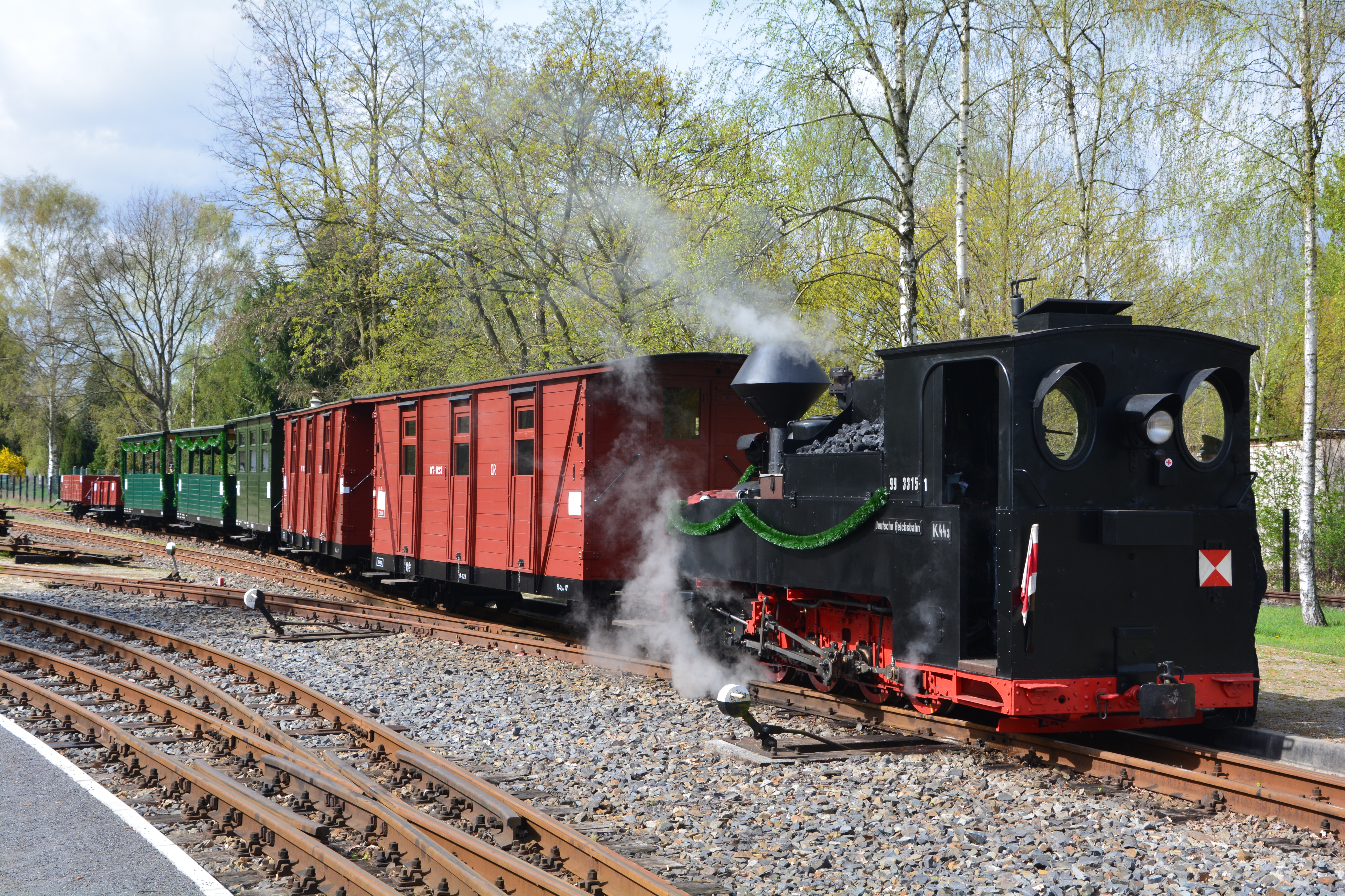 Waldeisenbahn Bad Muskau: Einweihung der "Tonbahn" am 14. bis 17. April 2017. Dampflok BR 99 3315-1, Baujahr 1917